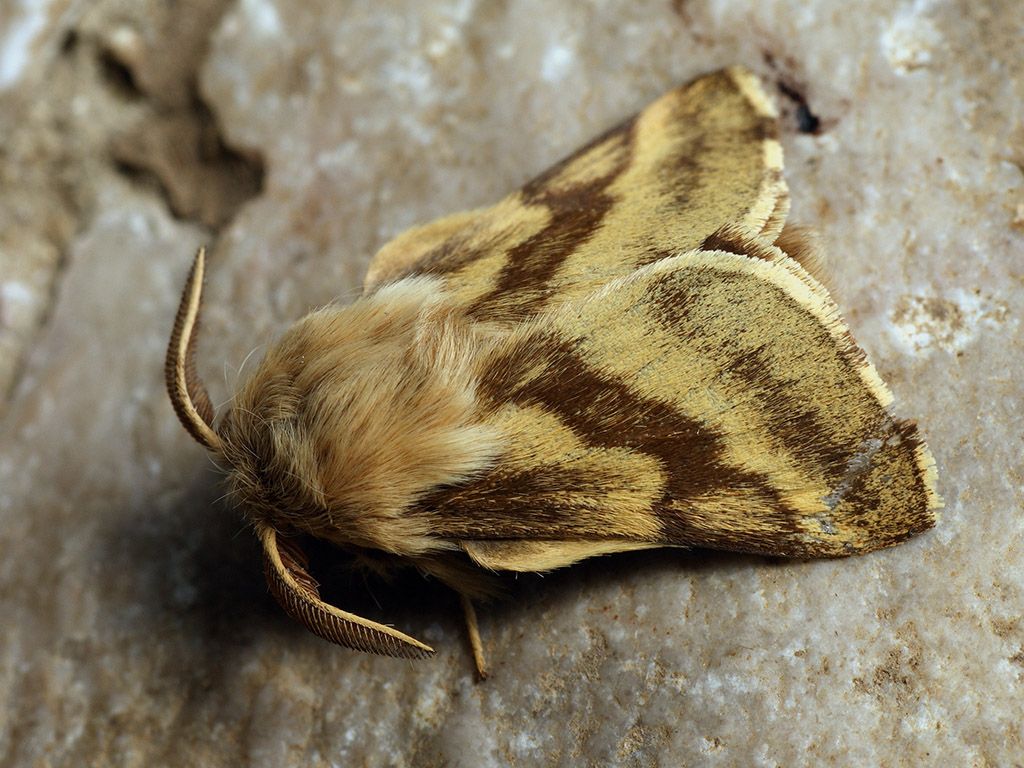 Exemplar found: Russia, Moscow Oblast, Odintsovsky District, near village Pestovo, 21.07.2017, by light МО, Одинцовский р-н, окрестности деревни Пестово, 21.07.2017, на свет